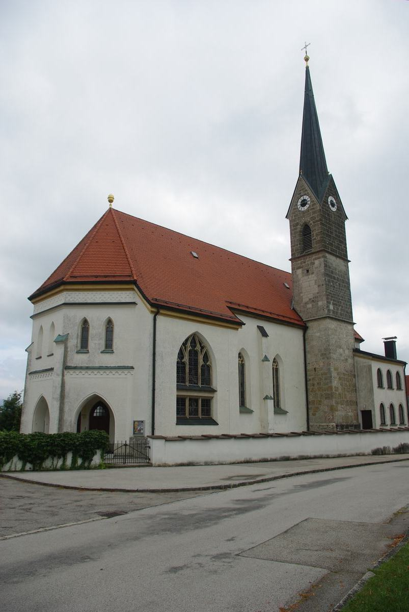 St.-Oswald-Str. 13, 83410 Laufen, Kath. Pfarrkirche St. OswaldThis is a photograph of an architectural monument.